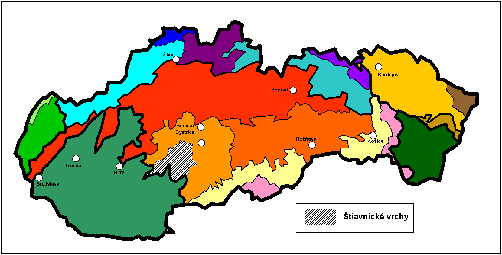 Stiavnické vrchy